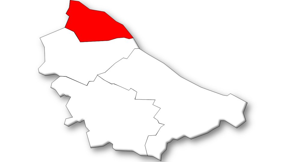 Evolução da População